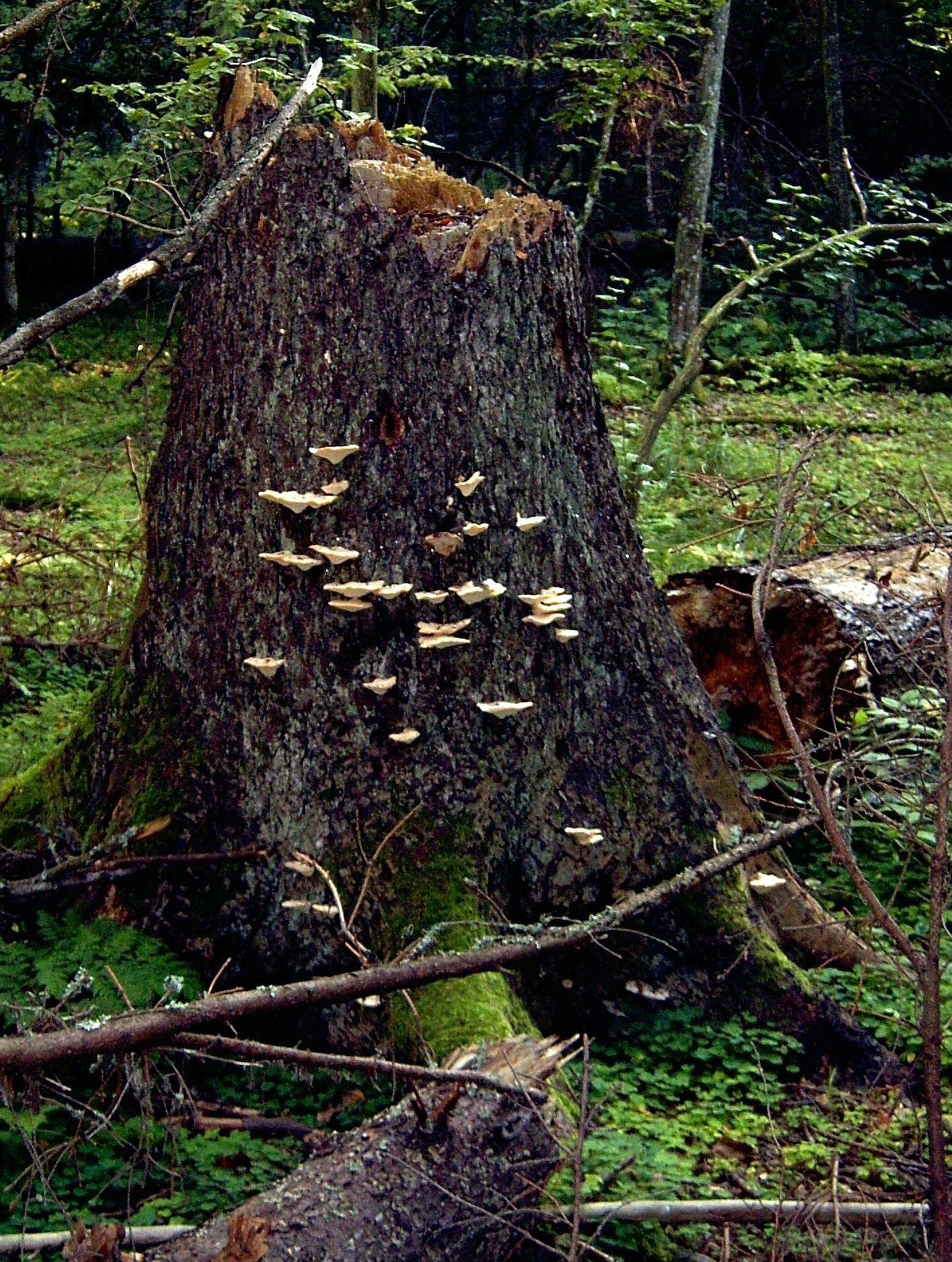 Białowieża-Nationalpark.